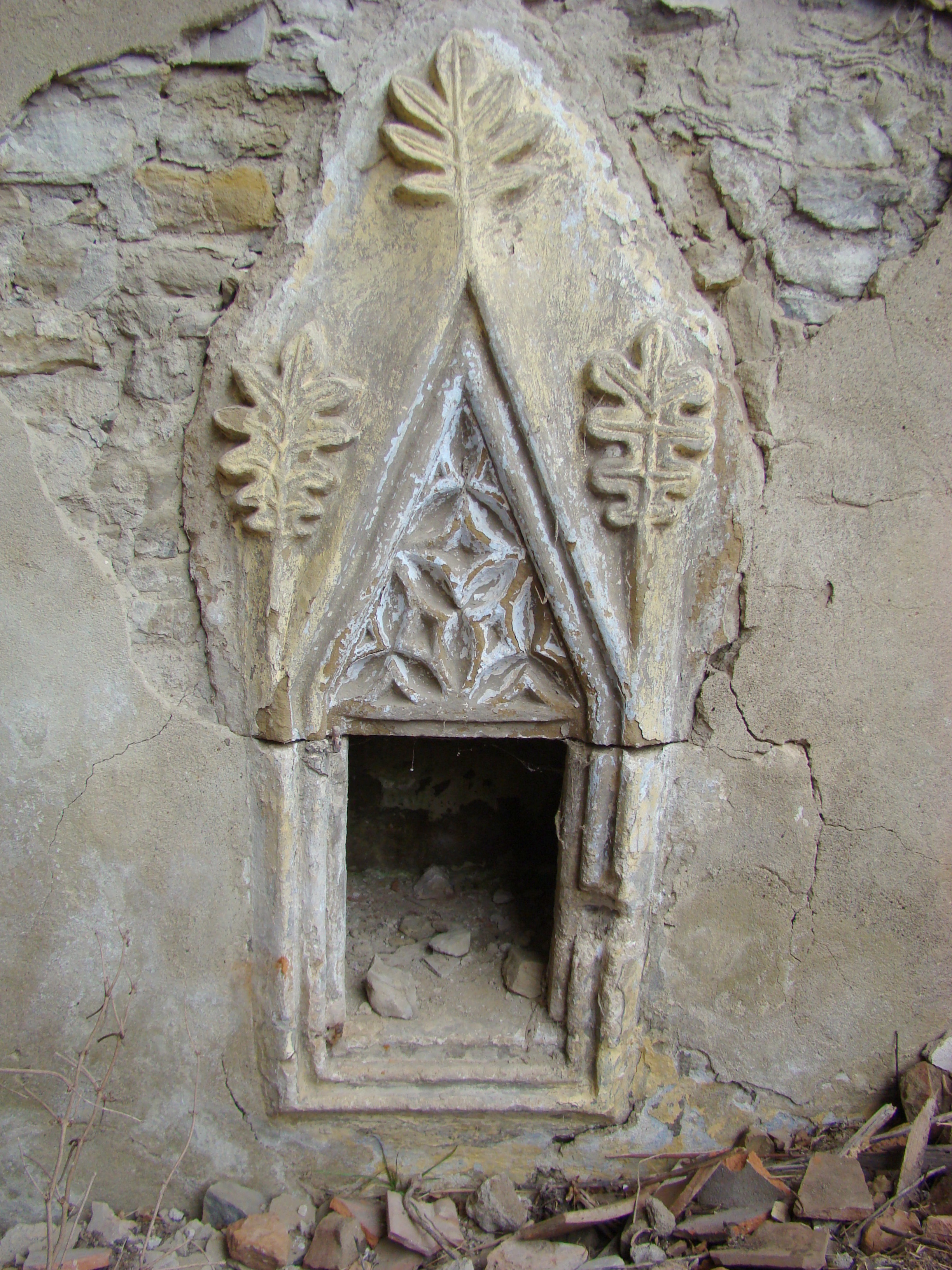 Biserica fortificată din Velţ